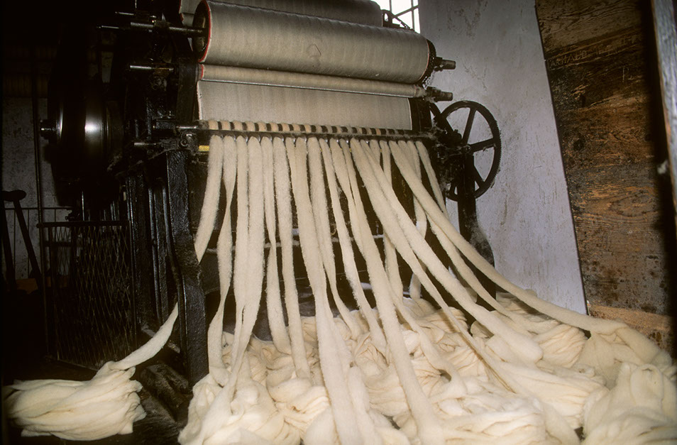 la carde fileuse dans l'espace des cardes, dernière transformation avant le filage